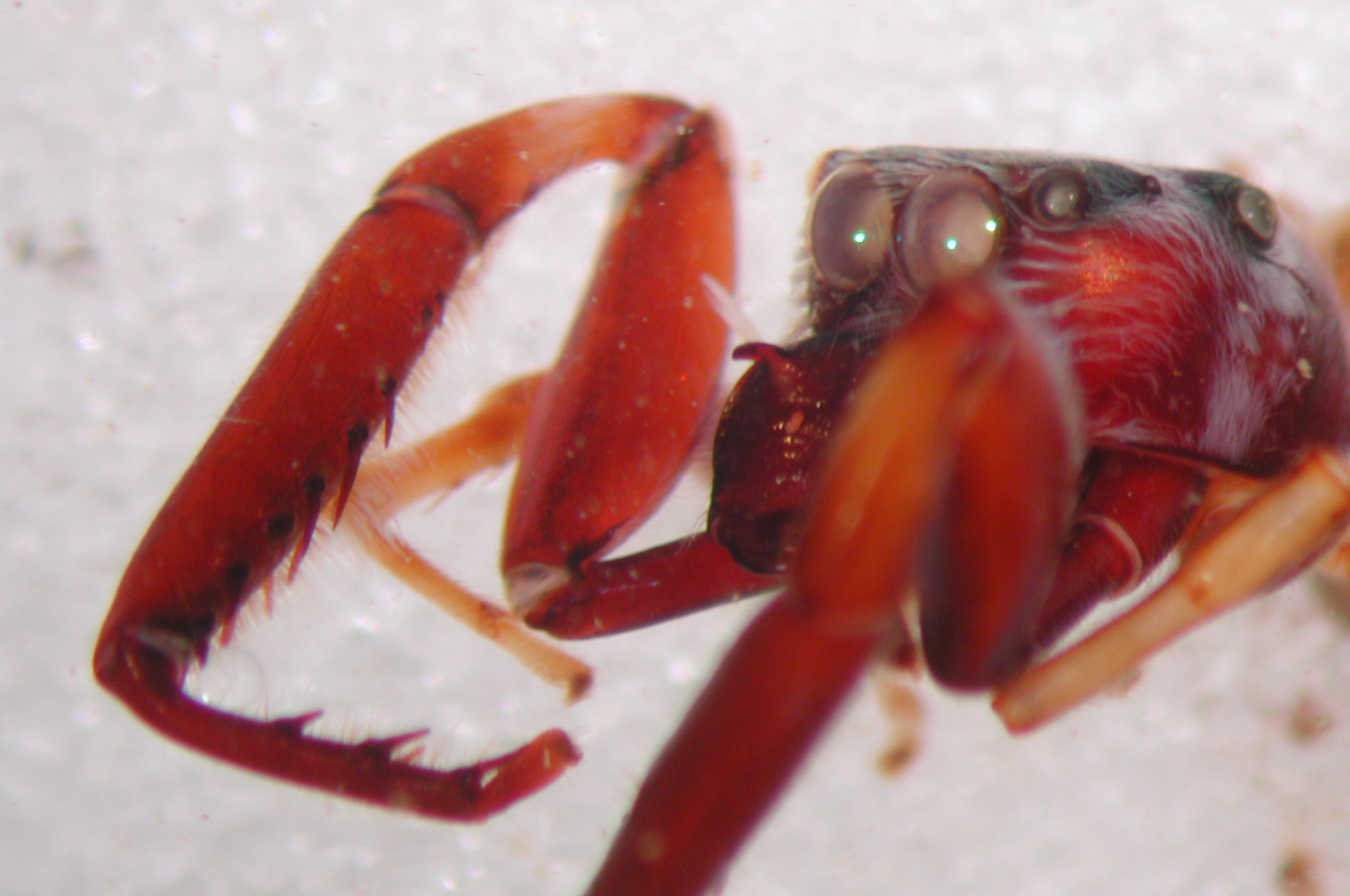 Male Udvardya elegans